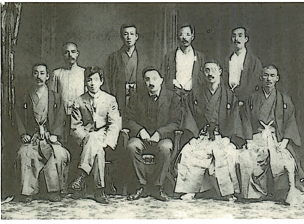 明治45年6月プラウト氏送別記念 熊本の岩田写真館にて撮影 前列右より多久安美、小島伊佐美、プラウト、三浦吉兵衛、白川精一 後列右より椎名十三、菊地行蔵、山田鉦太郎、宇佐美全賢